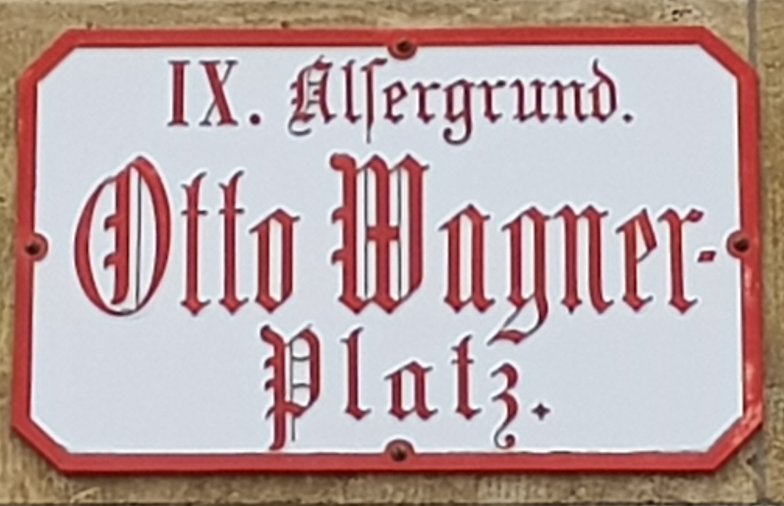 Straßentafel Otto-Wagner-Platz, Wien-Alsergrund